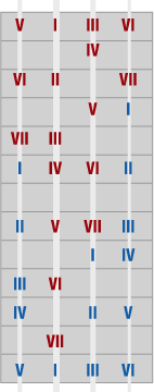 Les degrés sur une section quelconque du manche du ukulélé accordé en réentrant. Les degrés les plus graves sont représentés en rouge, les plus aigüs en bleu. illustration créée par Utilisateur:Ukepedia pour un site personnel, mise sous GFDL par l'auteur pour utilisation sur Wikipédia